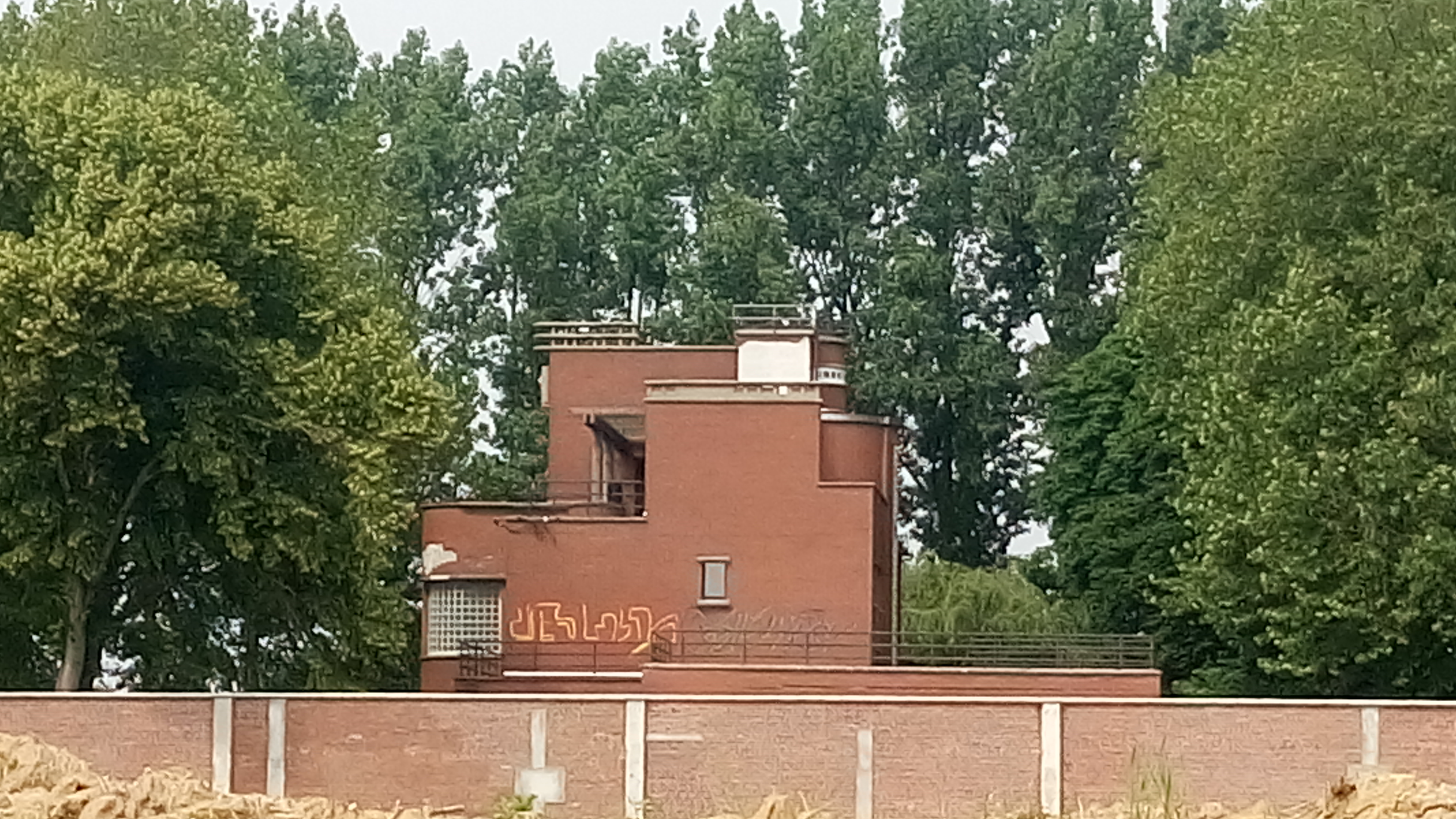 Maison Dumont - Art Nouveau